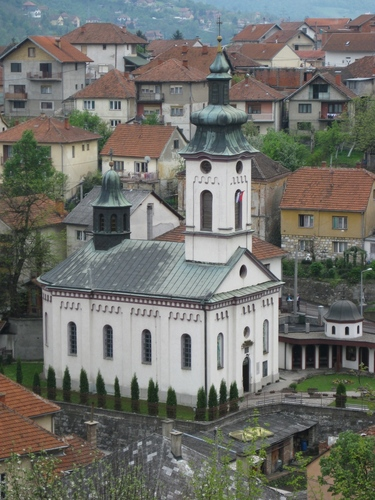 Hram Rođenja Svetog Jovana Krstitelja.